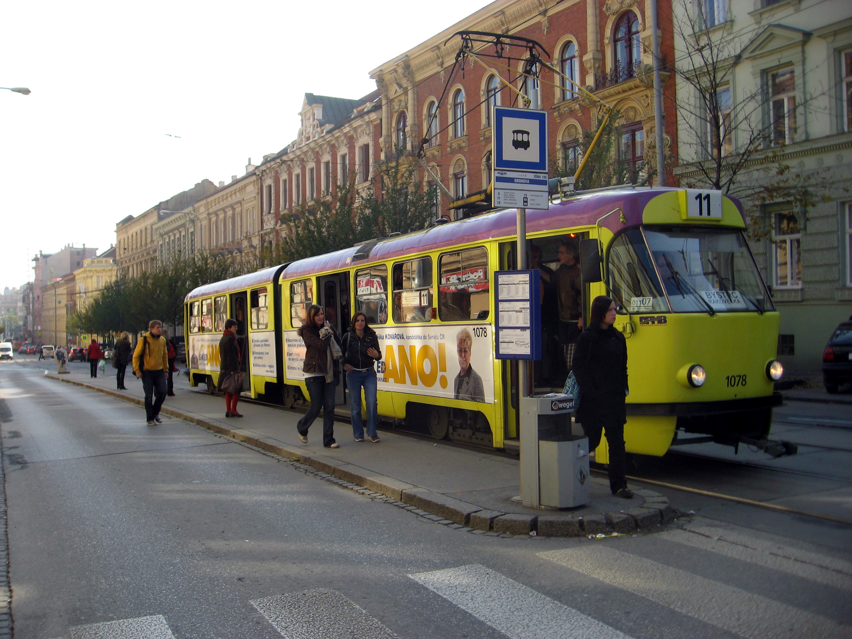 Tramvaj č. 1078